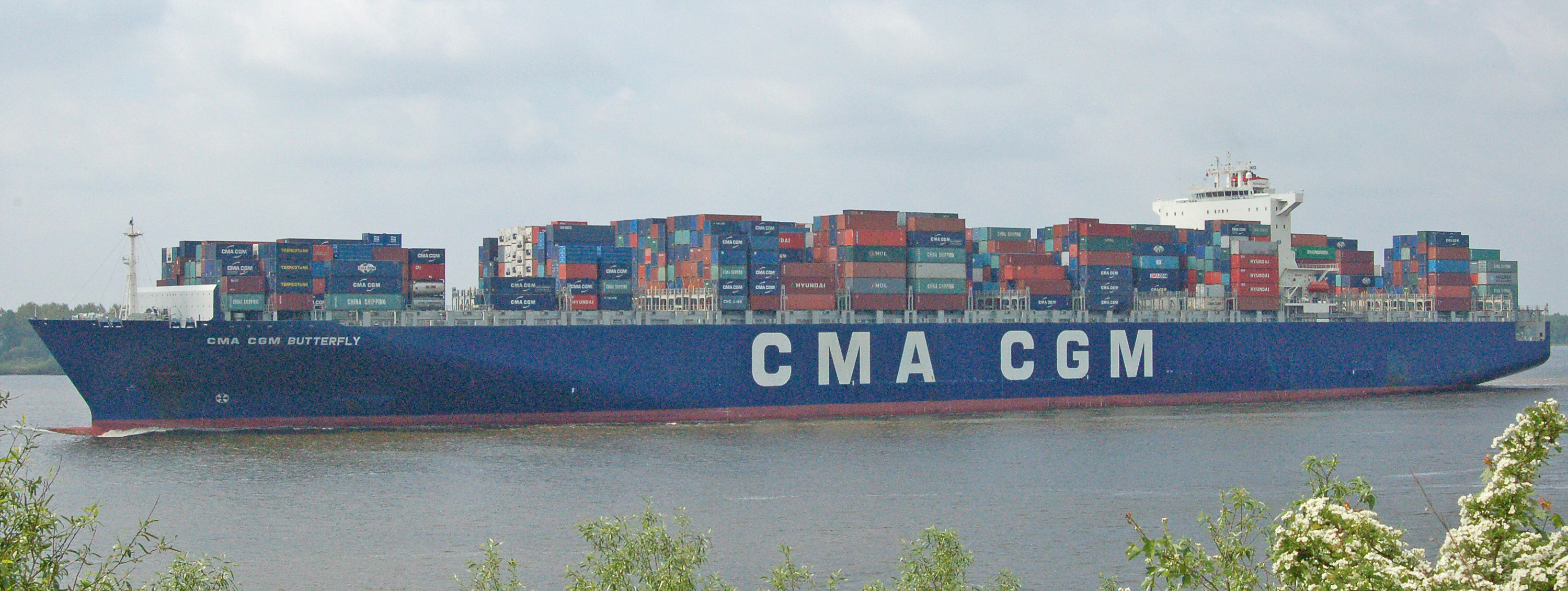 Das Containerschiff CMA CGM Butterfly (ex Hull 1892) auf der Elbe bei Hetlingen in der Haseldorfer Marsch. IMO-Nummer: 9365790 MMSI-Nummer: 636091420 Rufzeichen: A8NO8 Länge: 350.0m Breite: 43.0m Leergewicht: 59.000 Tonnen Bruttoregistertonne (BRT):117.000 Flagge: Liberia Baujahr 2008